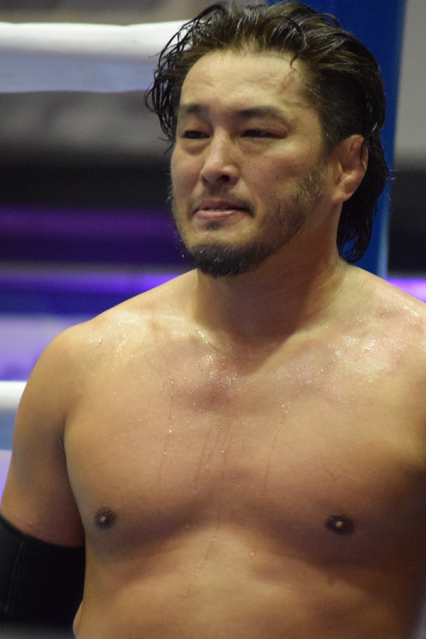 2017年7月30日 大阪府立体育会館・第2競技場 「2017 SUMMER ACTION SERIES」 青木篤志